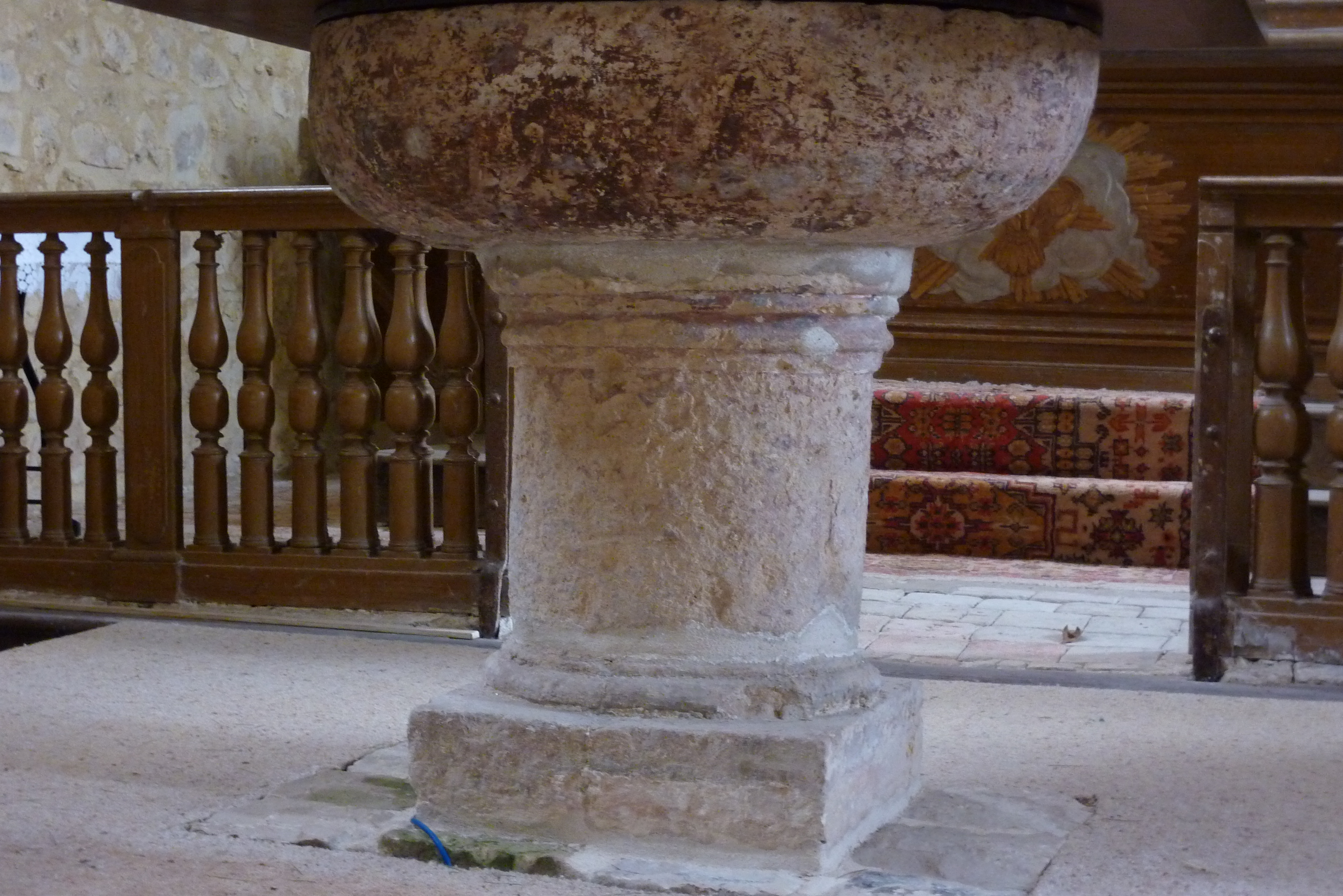 katholische Kirche Saint-Martin in Breux-Jouy, Taufbecken